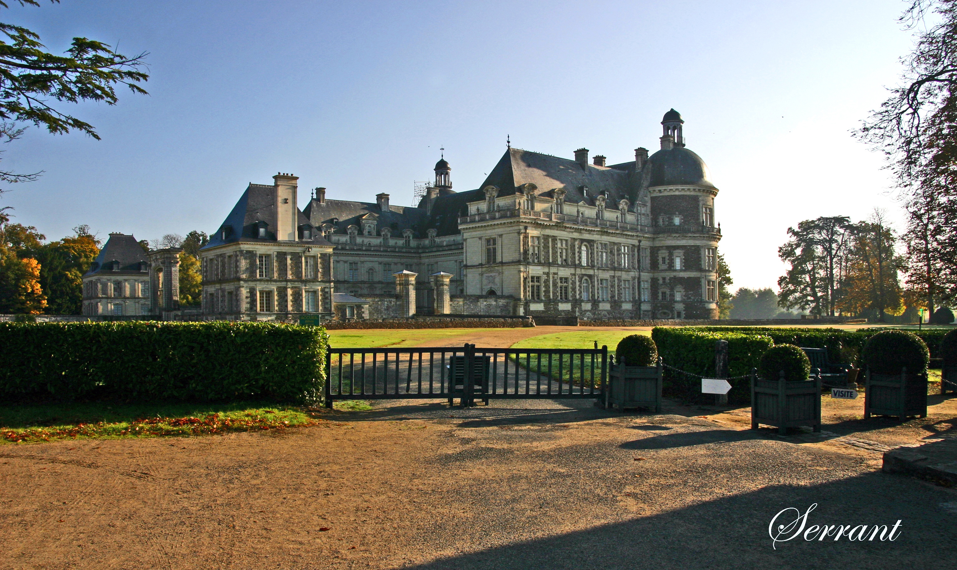 Schloss Serrant